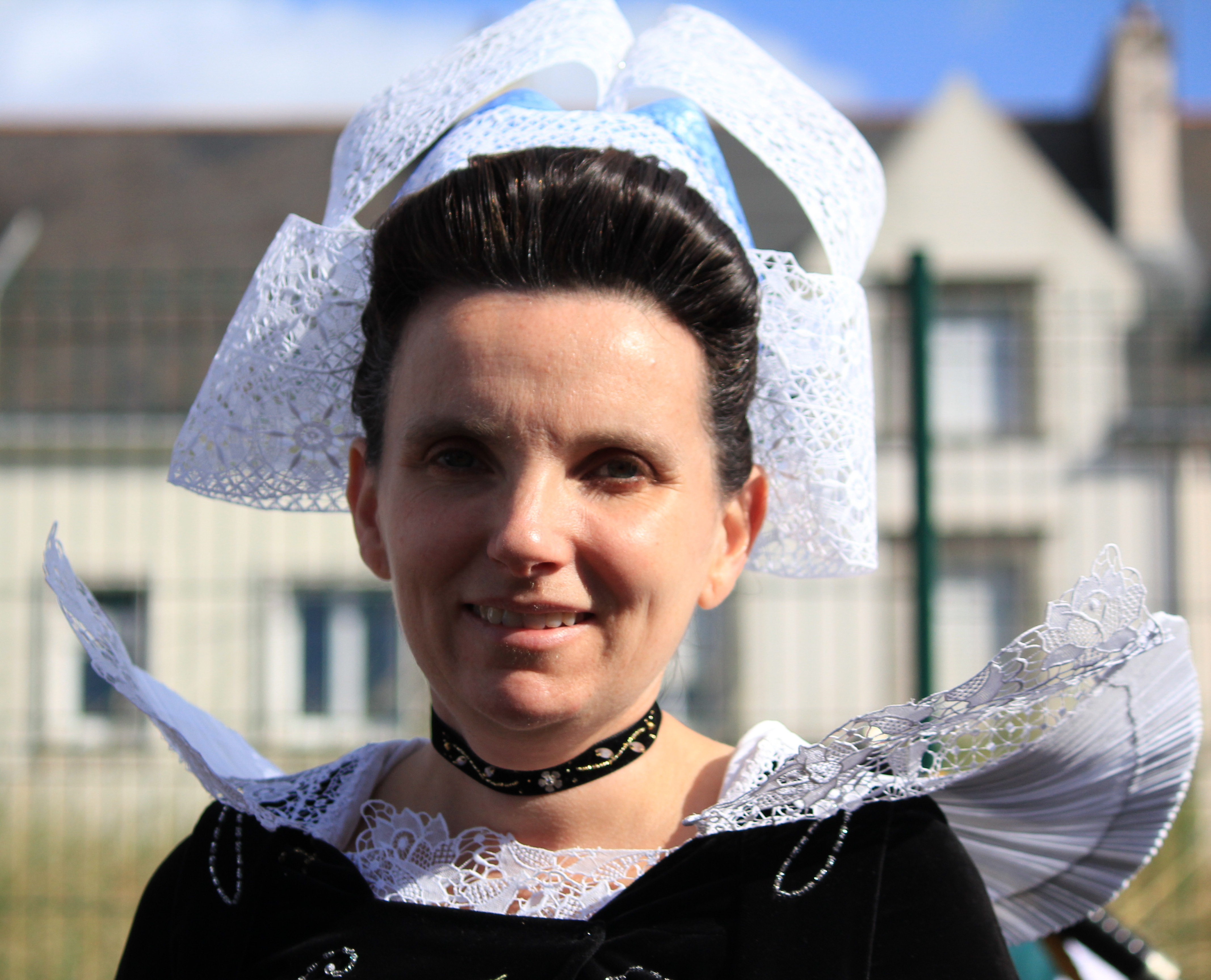 Coiffe bretonne porté par le Cercle Ar Pintiged Foen de Fouesnant pendant le Festival Interceltique de Lorient en 2012